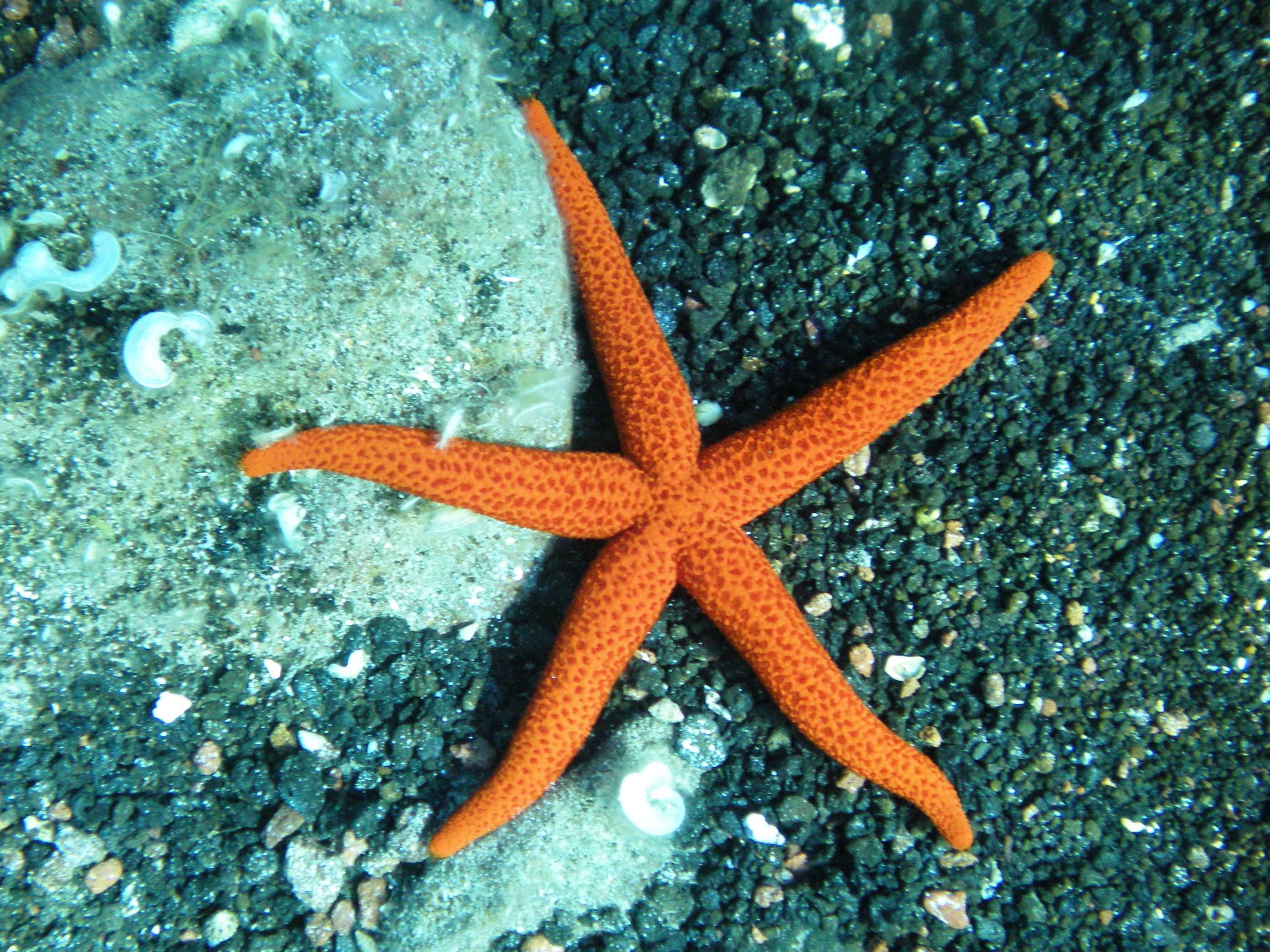 Echinaster sepositus Linosa, Sicily